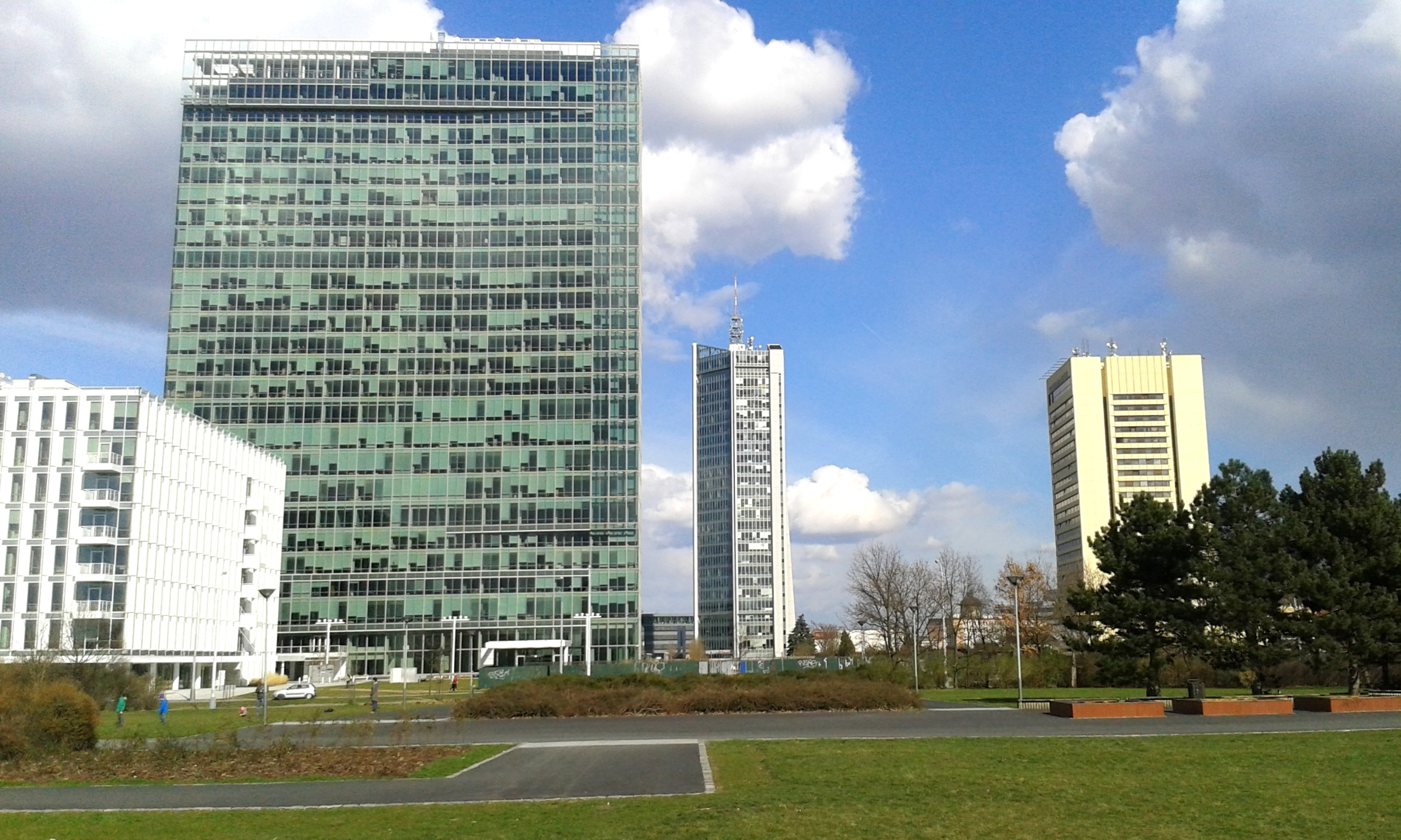 Pankrácká pláň